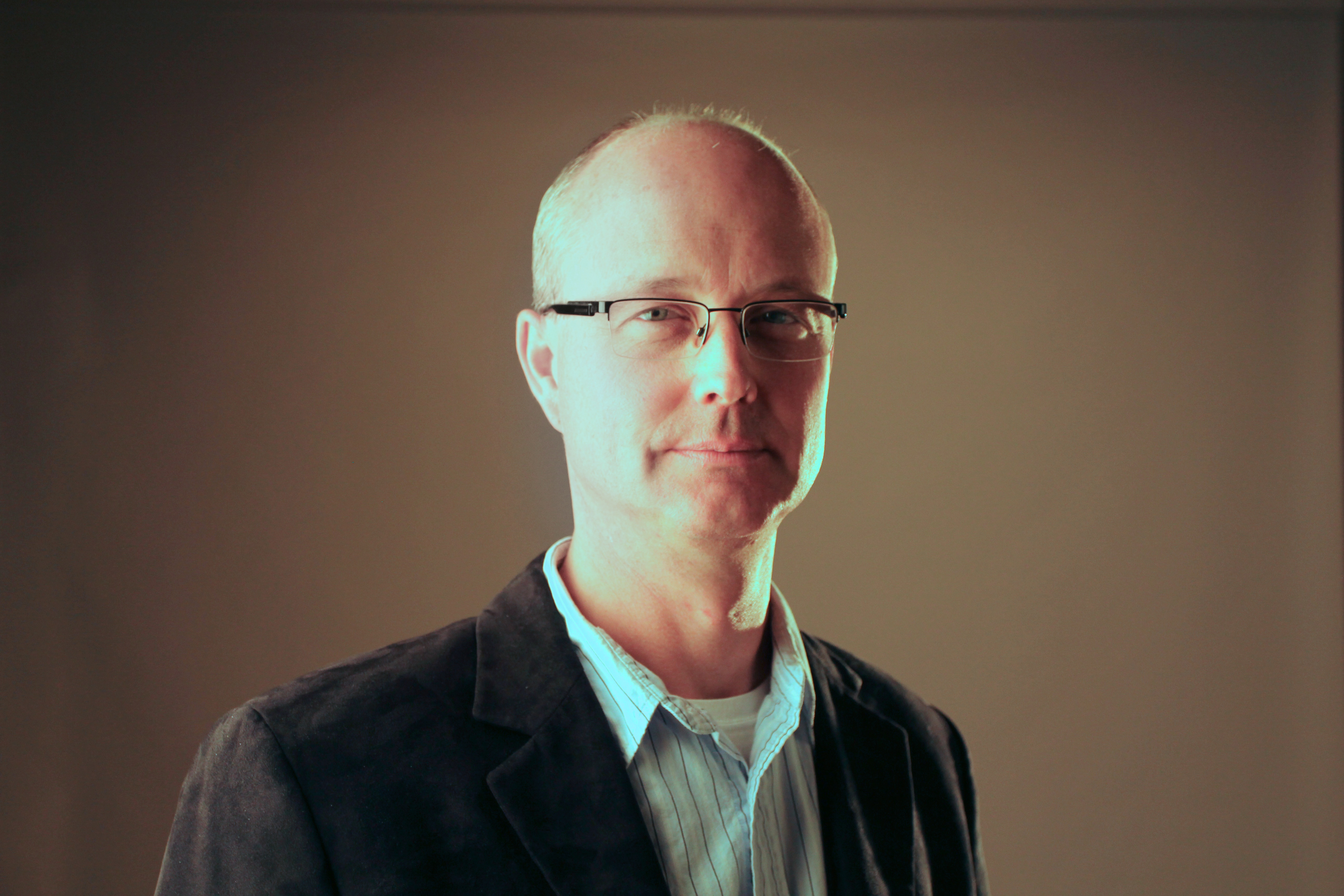 David Peck